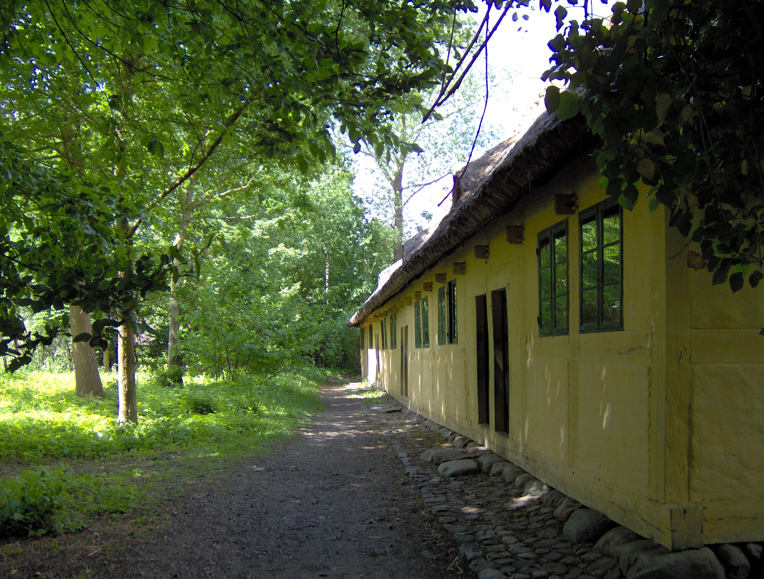 Fotograferet på Frilandsmuseet ved København